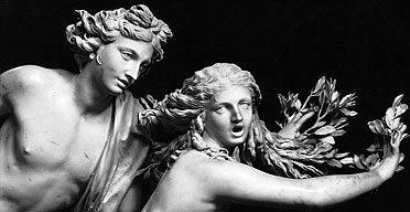 Den tjeckiska konstnären Toyen inspirerades av detta verk och utförde målningen "Vid en viss timma" där Berninis Dafne syns genom ett fönster.